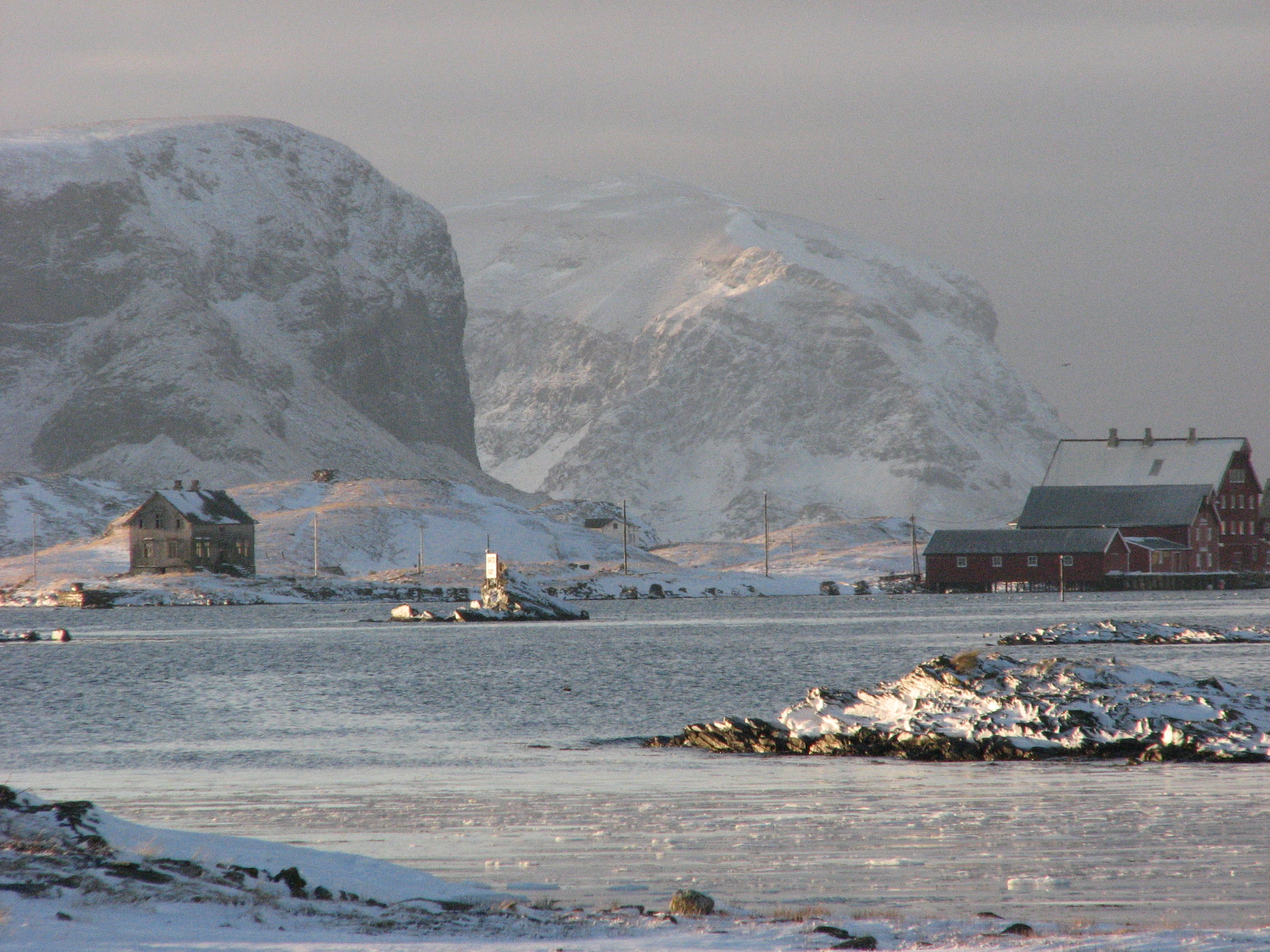 vinter lofoten røst